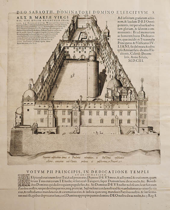 Festung Marienberg, Kupferstich von Johannes Leypolt (Leypoldt) nach Visierung oder Modell von Jacob Wolff d. Ä. 1603/1604, aus: Christoph Marianus: Encaenia et tricennalia Juliana, Würzburg 1604.